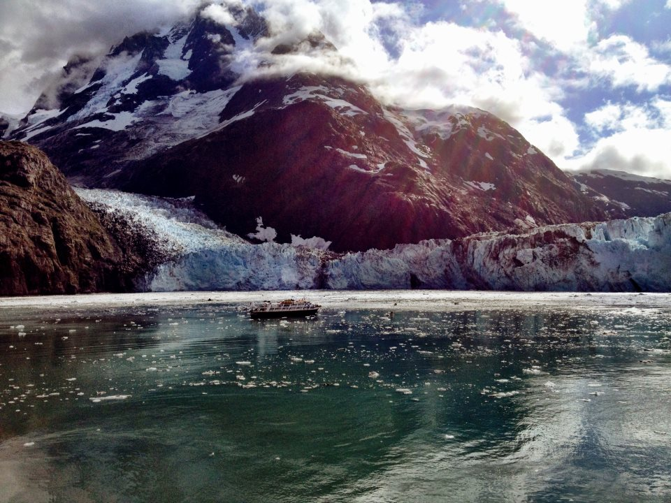 Glacier Bay National Park, Alaska Photo By: Jen Epstein epstein10